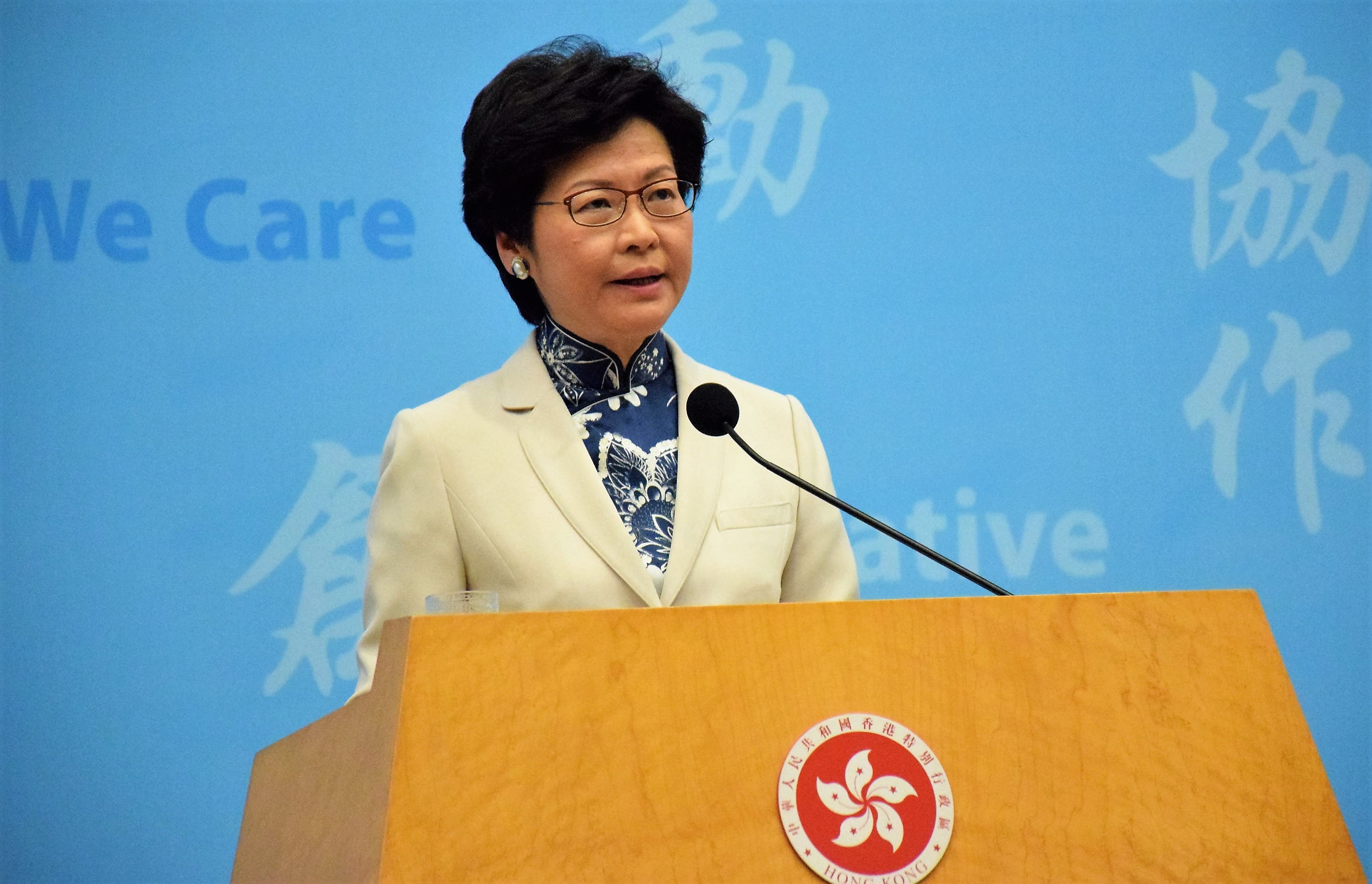 中文（香港）: 香港候任特首林鄭月娥。(美國之音湯惠芸)